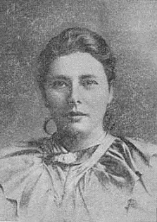 Sof'ja Grigor'evna Anan'eva Rabinovic (1856-1942), moglie di Petr Kropotkin (1842-1921)